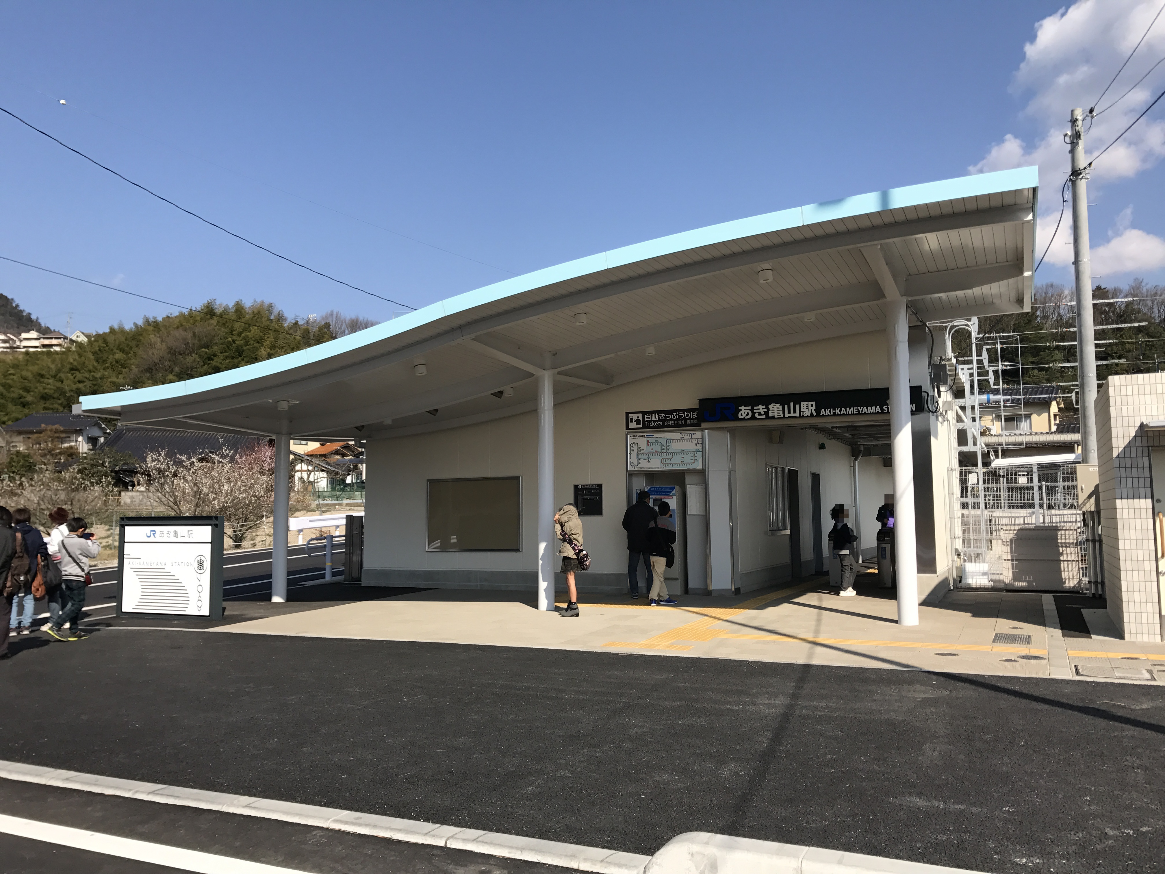 あき亀山駅駅舎